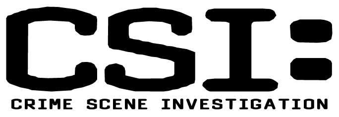 Fuente tipográfica con las siglas de la serie CSI.